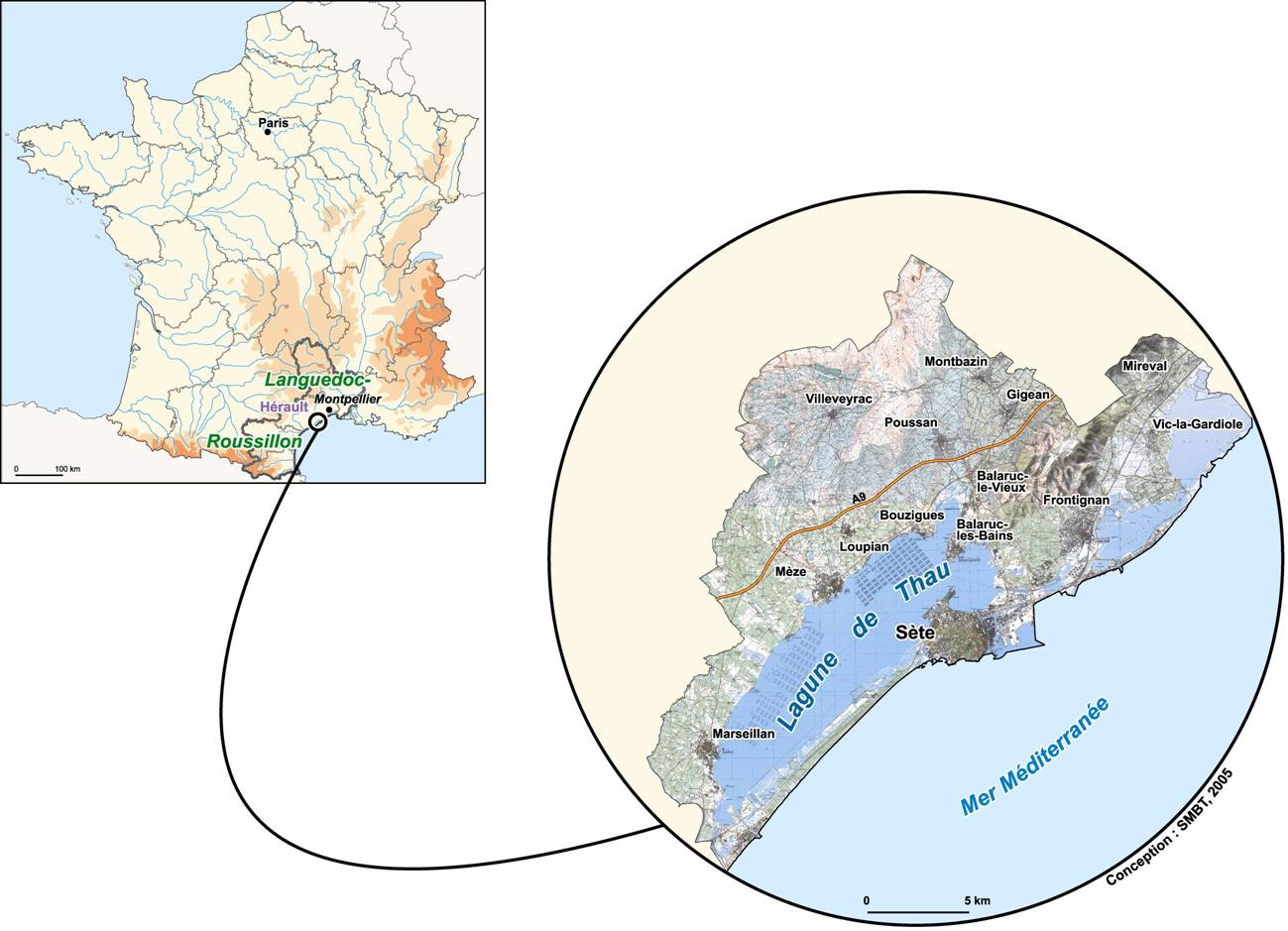 Arpetan: L'étang de Thau en Languedoc-Roussillon